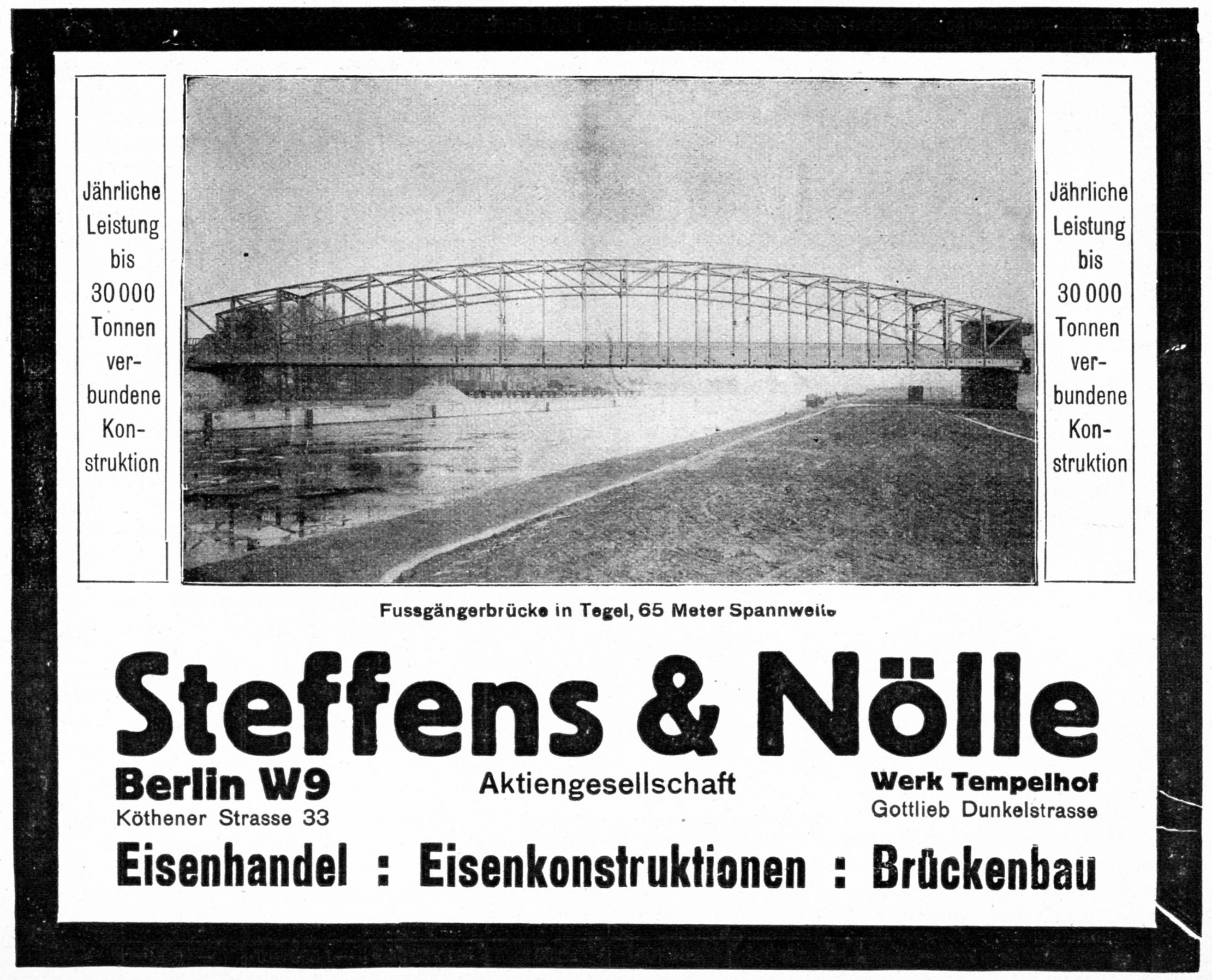 Werbeanzeige der Baufirma Steffens & Nölle mit der Tegeler Hafenbrücke, veröffentlich in der Zeitschrift Bauwelt, 2. Jahrgang, Nr. 121 (9. Dezember 1911), S. 26